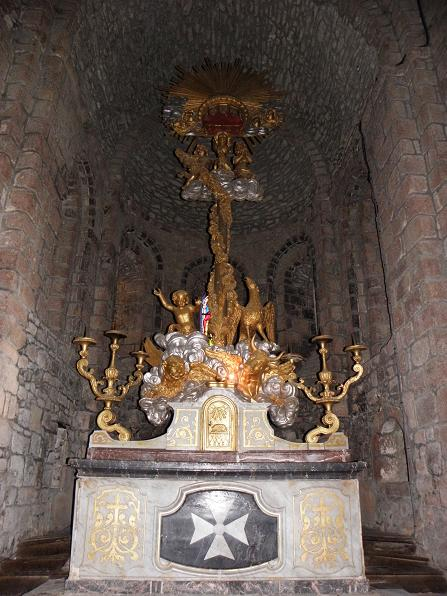 Maître-autel (classé) de l'église St-Martin de Tremblay (35)